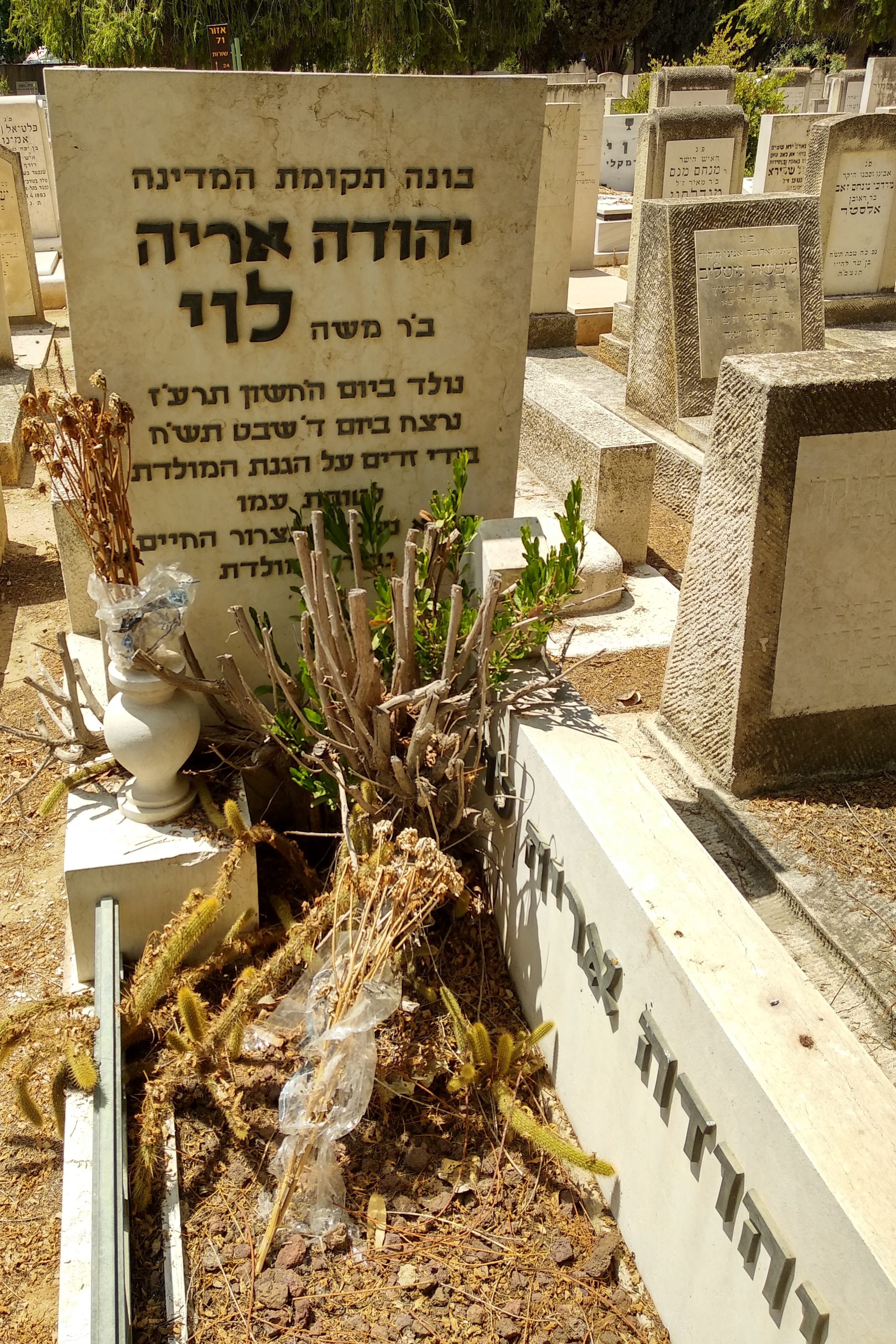 קברו של יהודה אריה לוי